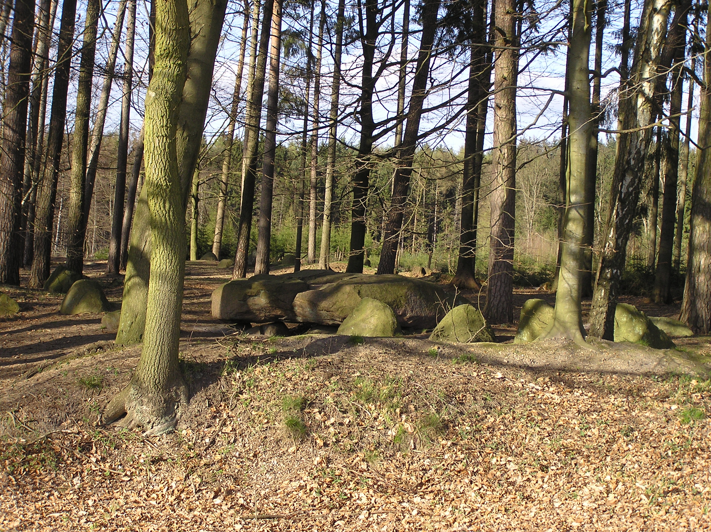 Dassendorf "Riesenbett" Langbett (Landesaufnahme Sachsenwald LA773 des Landesamt für Vor und Frühgeschichte von Schleswigholstein Sprockhoff 299)